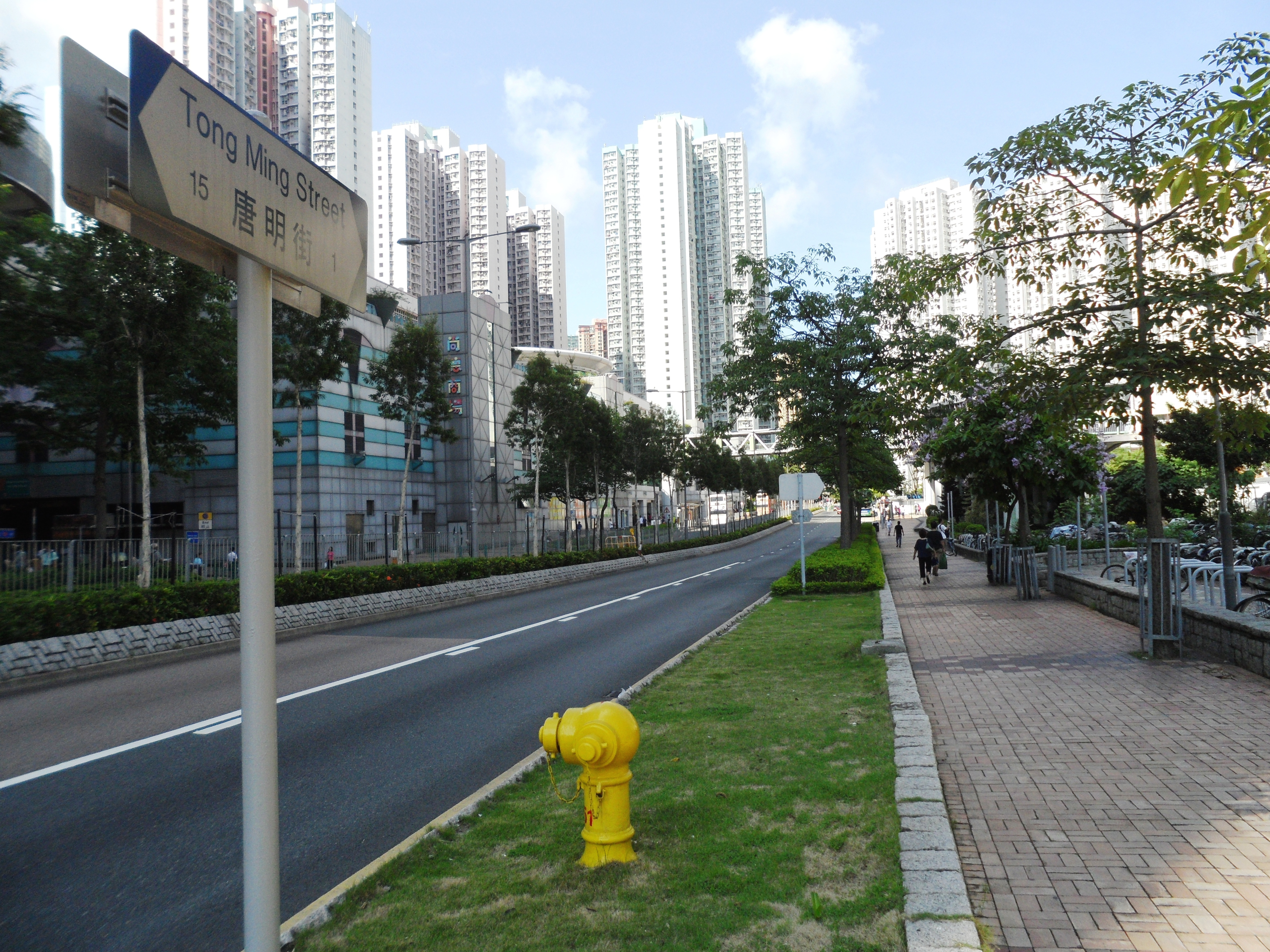 唐明街鄰近尚德商場